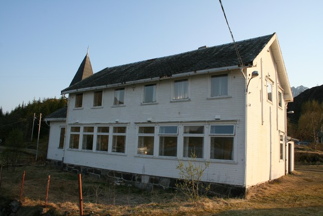 Hanøy kirke i Hadsel